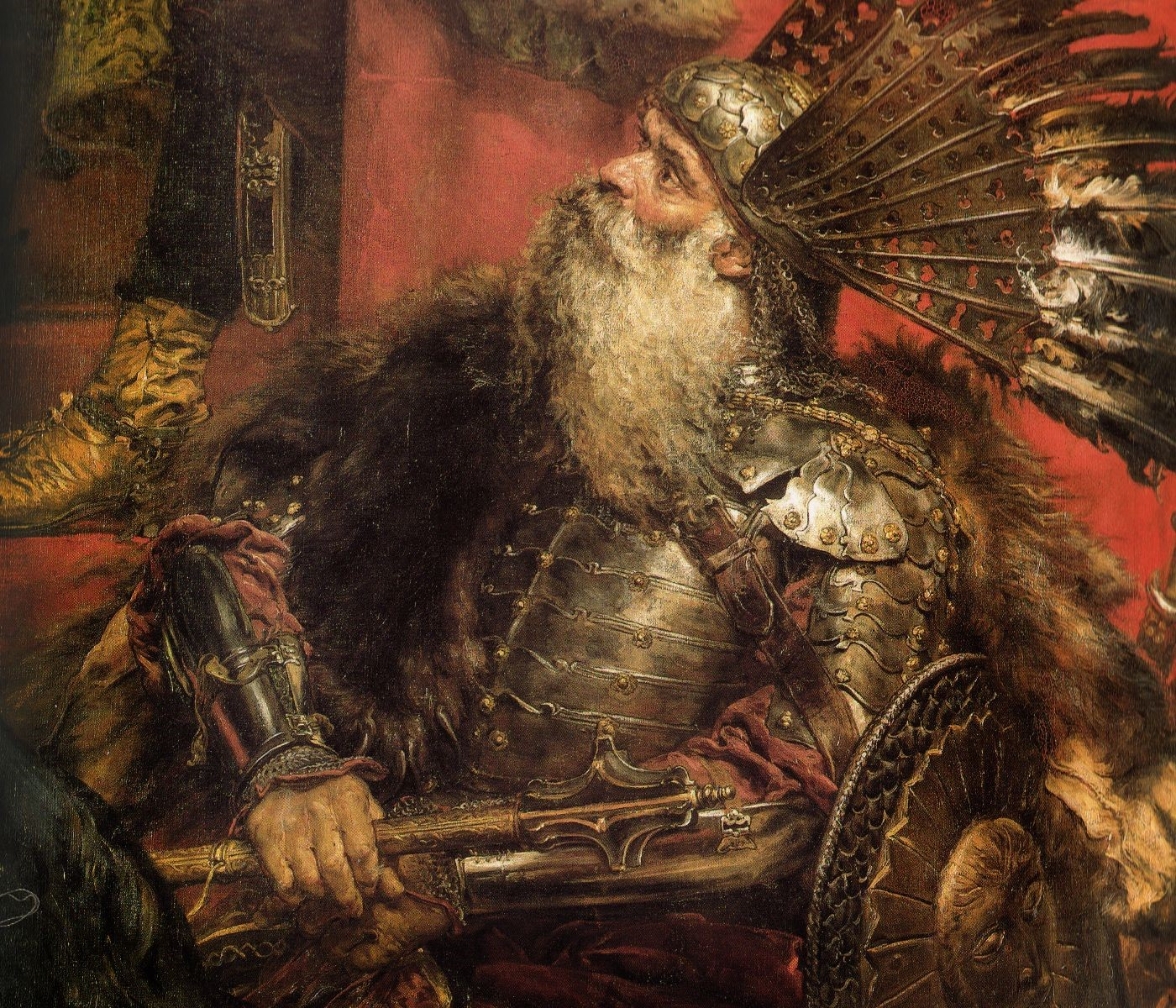 Prussian Homage by Jan Matejko. Fragment: Przecław Lanckoroński. Category:Jan Matejko paintings